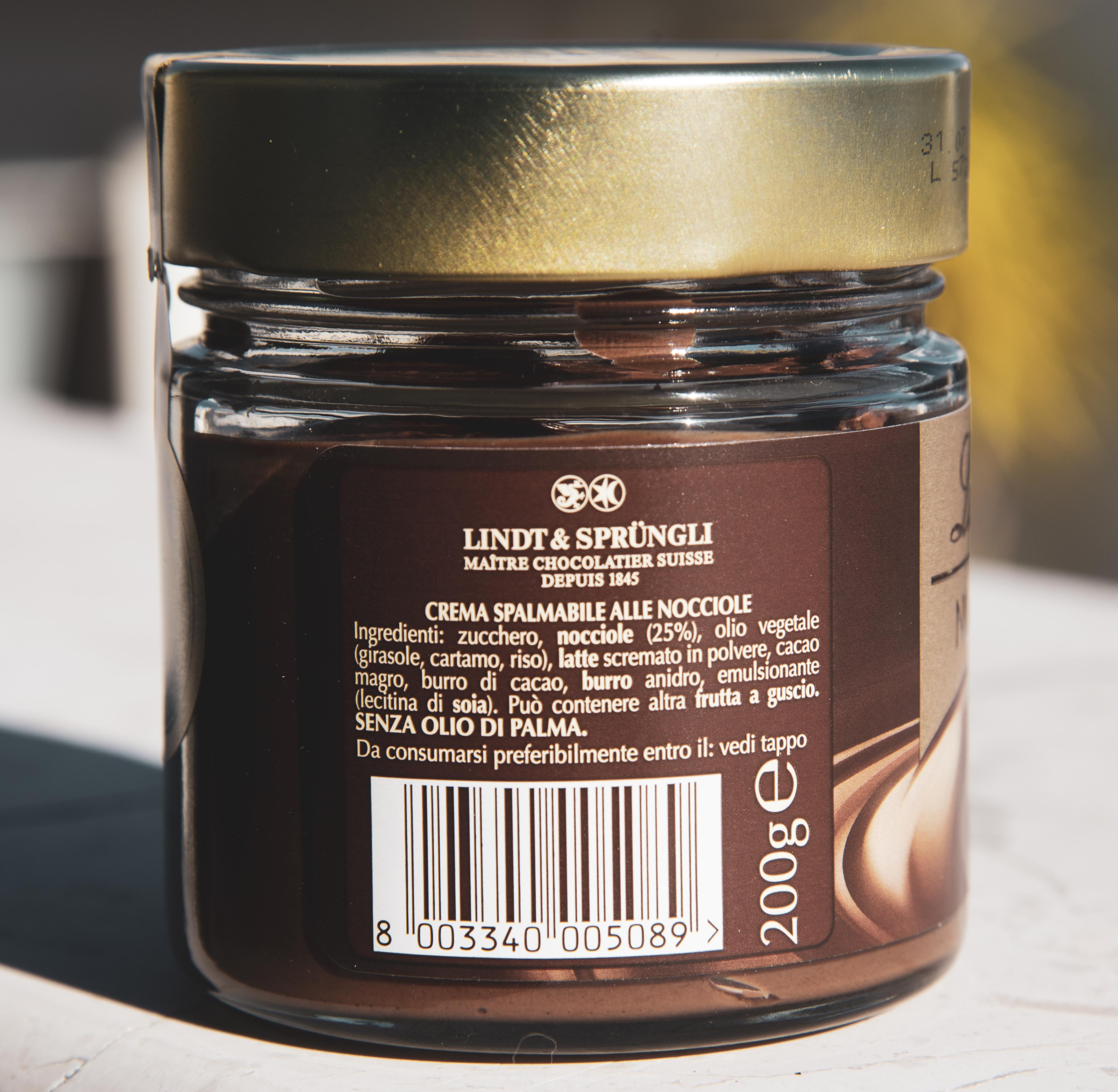 Nella composizione chimica è ben visibile, quale uno dei componenti delle materie grasse, la presenza di olio di cartamo.